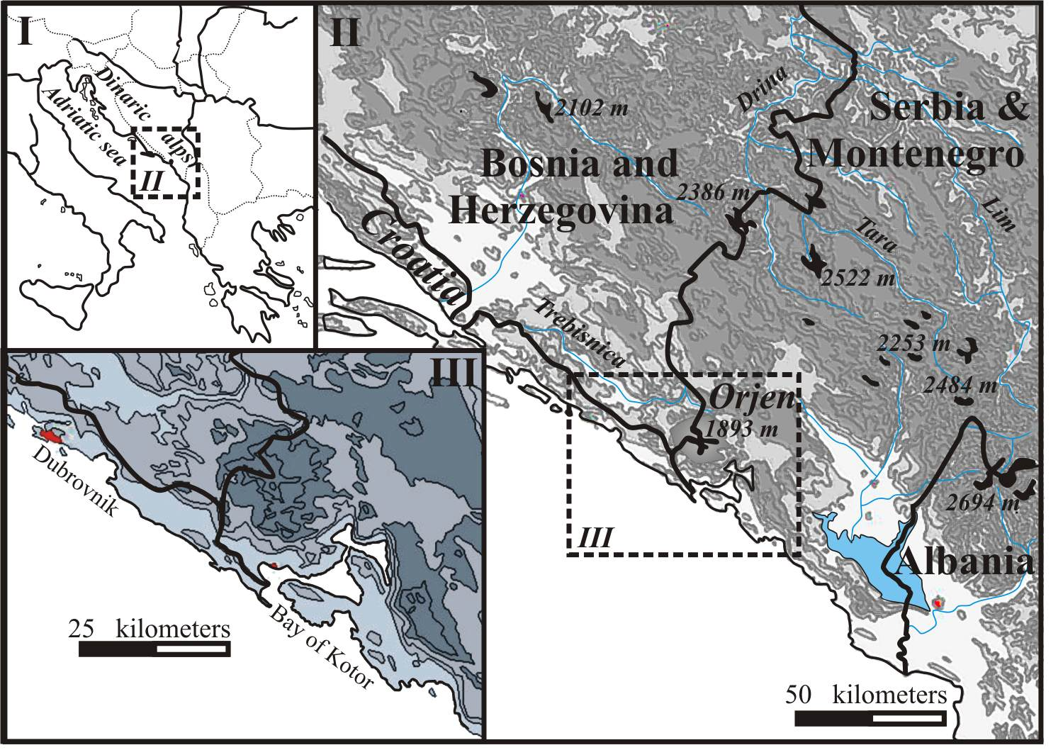 Übersichtskarten der Bucht von Kotor